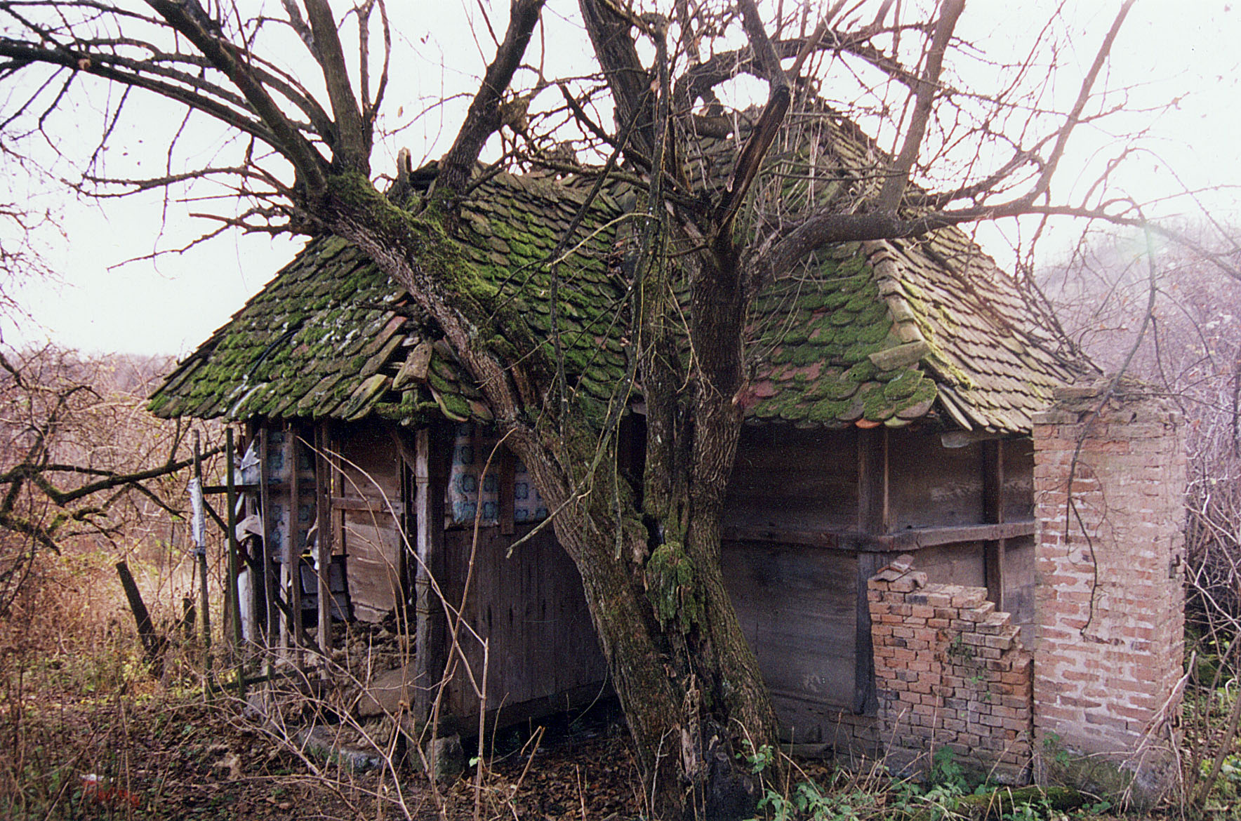 Магаза породице Томић, село Ручићи поред Горњег Милановца. Највероватније средина 19. века.